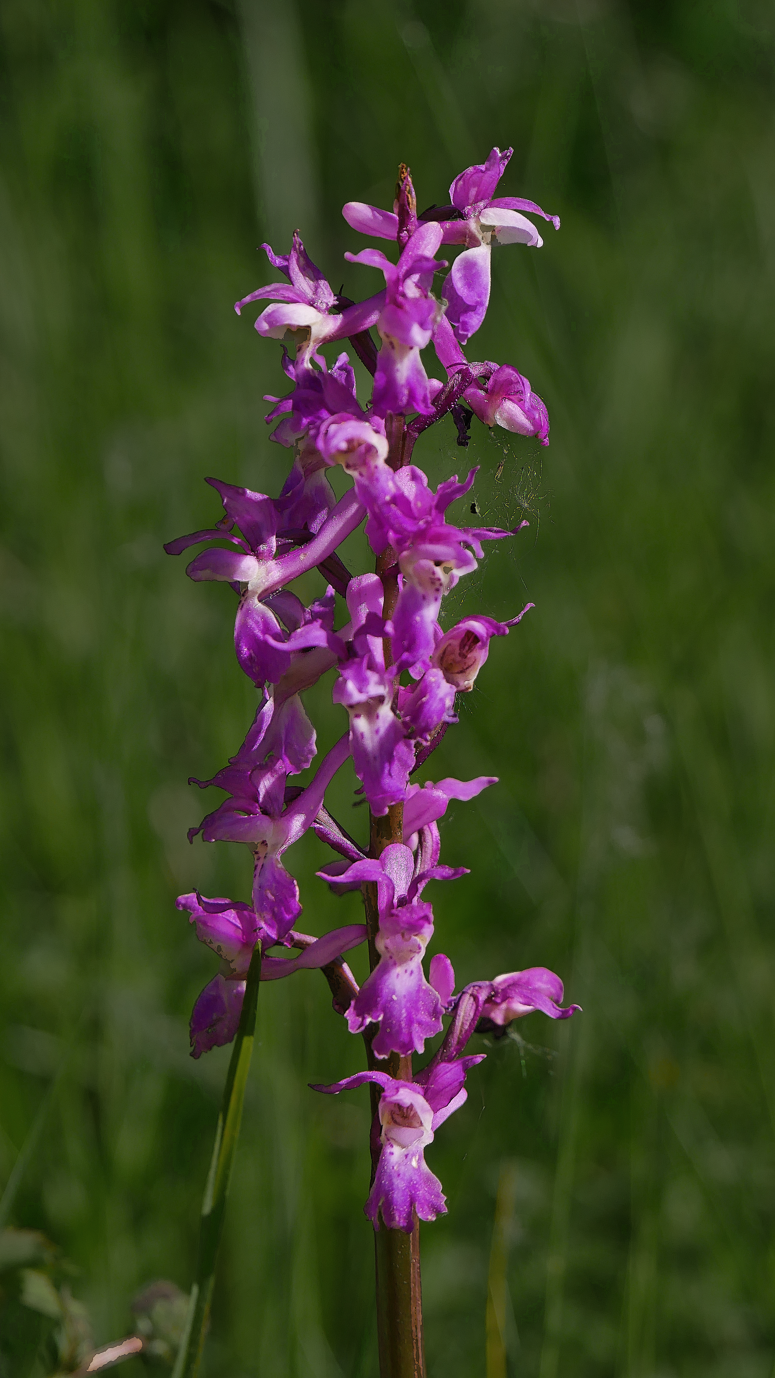 Trierː Naturschutzgebiet Kahlenberg (an der Bitburger Straße) Blühte des "Männlichen Knabenkrauts"